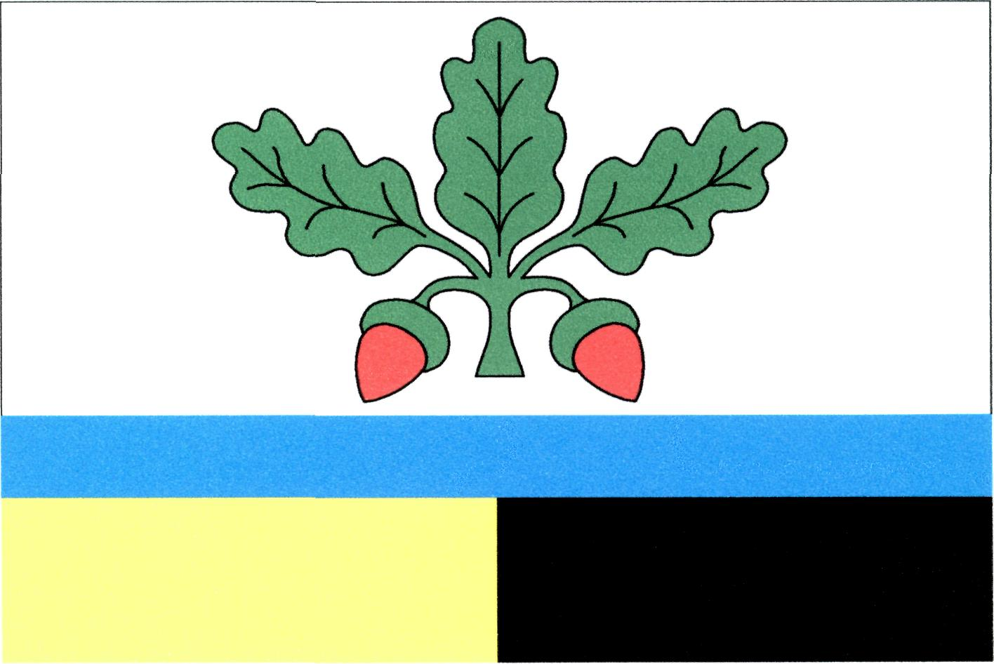 Vlajka obce Dubnice